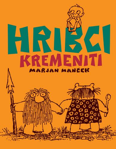 Naslovnica albuma 'Hribci kremeniti'